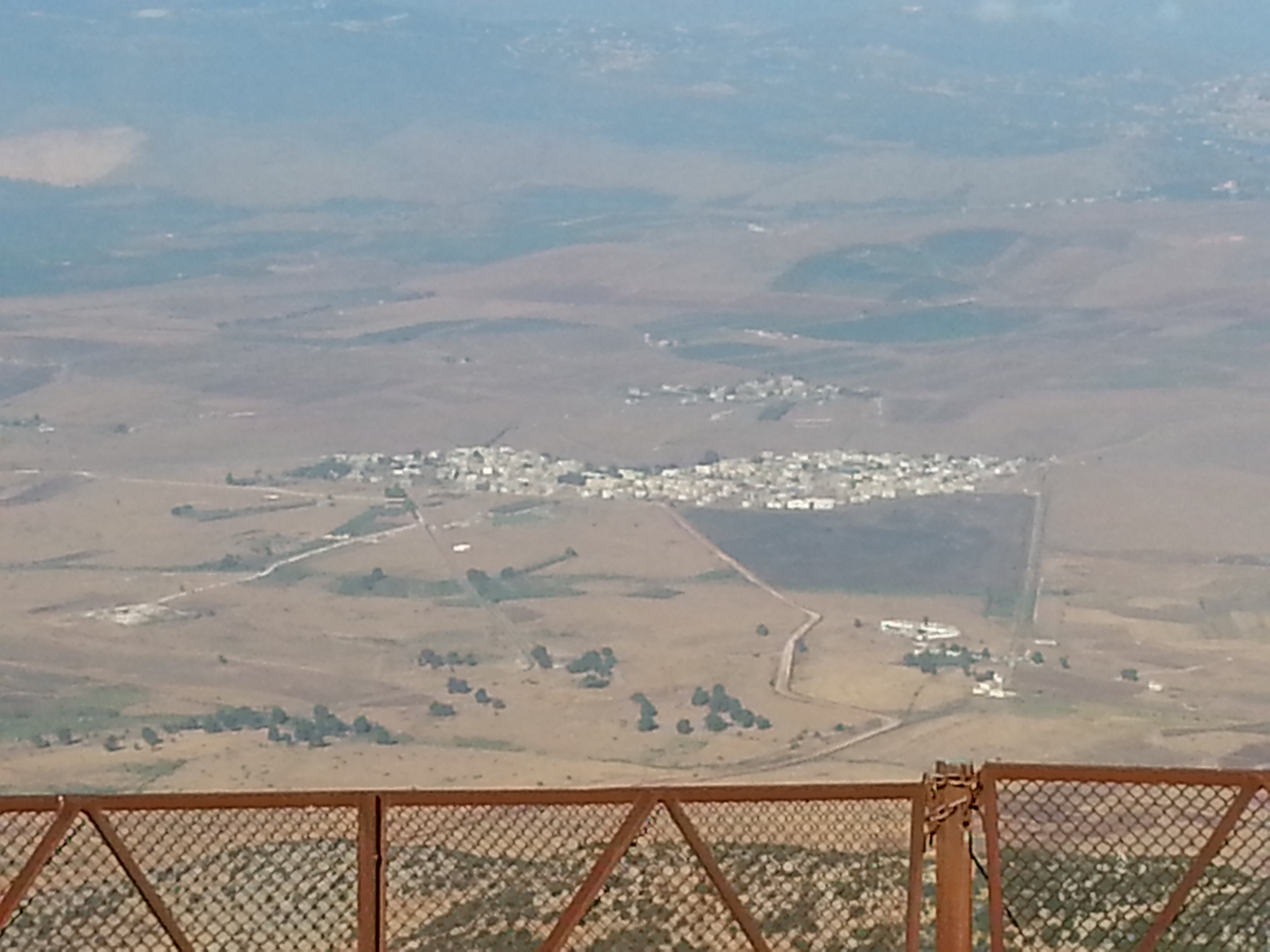 כפר ע'ג'ר